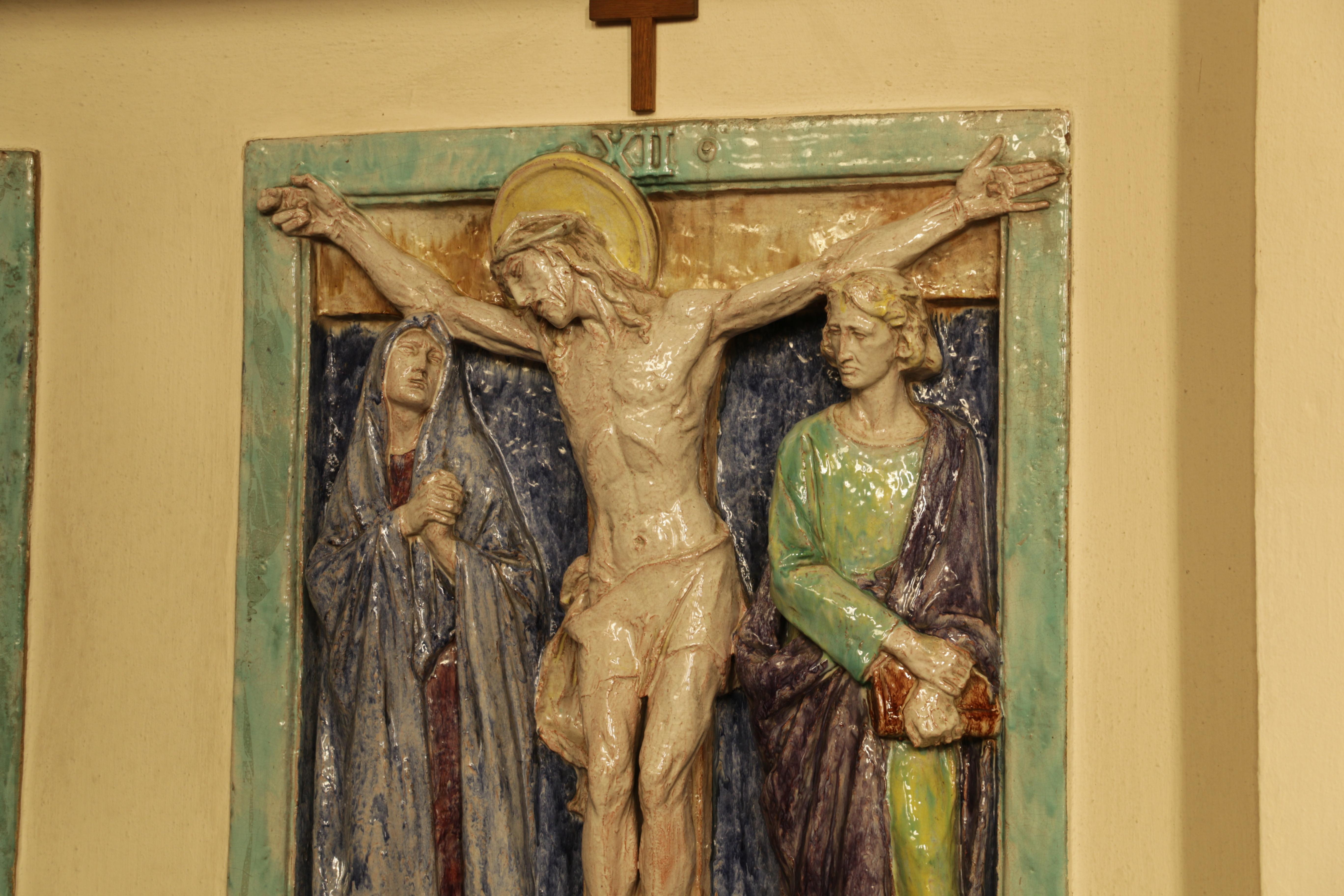 Station des Majolika-Kreuzweges im Eichsfelder Dom zu Effelder.